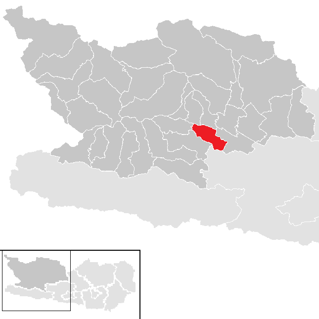 Bezirk Spittal an der Drau